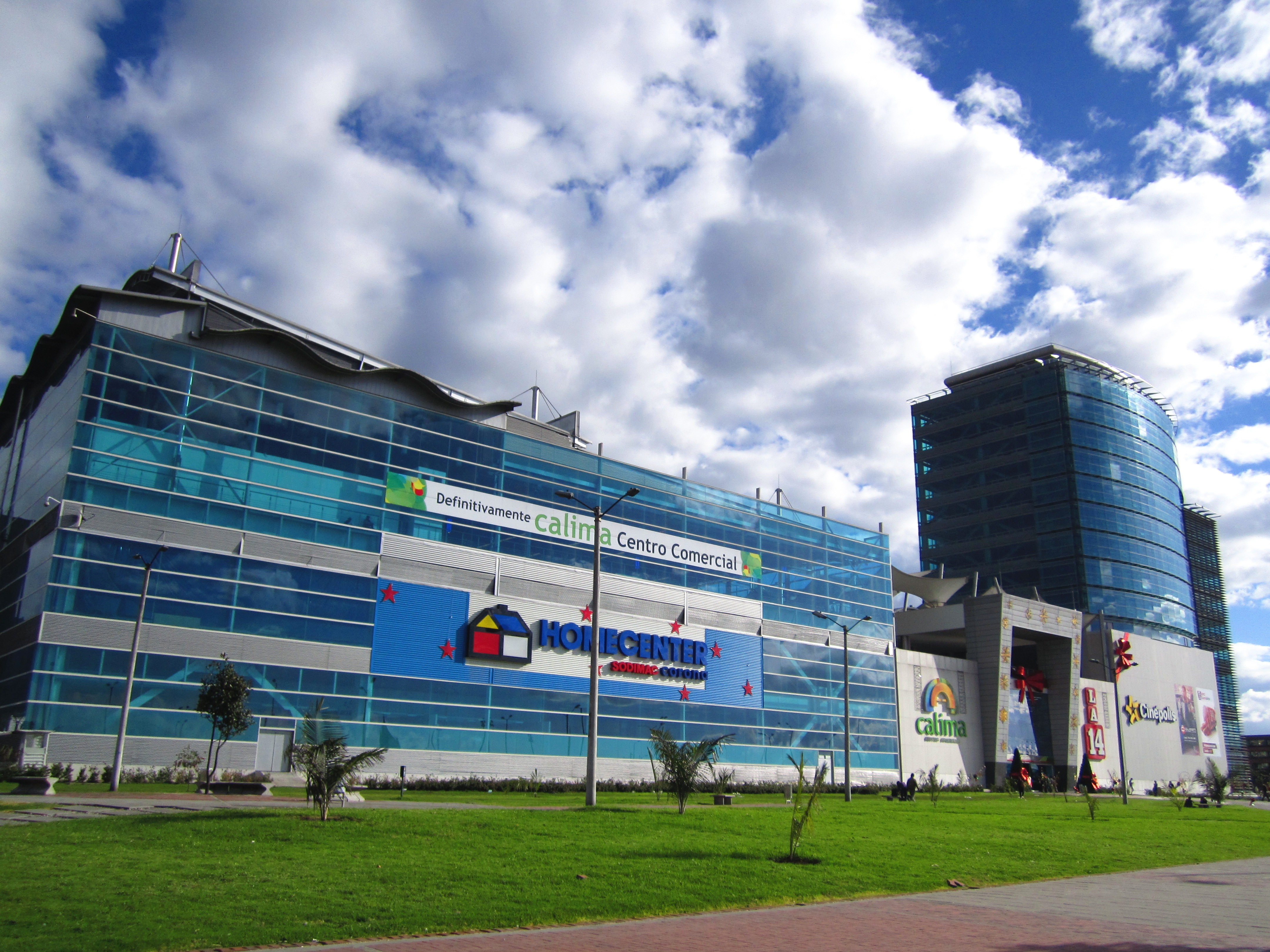 Fachada del centro comercial Calima en la Localidad bogotana de Los Mártires.